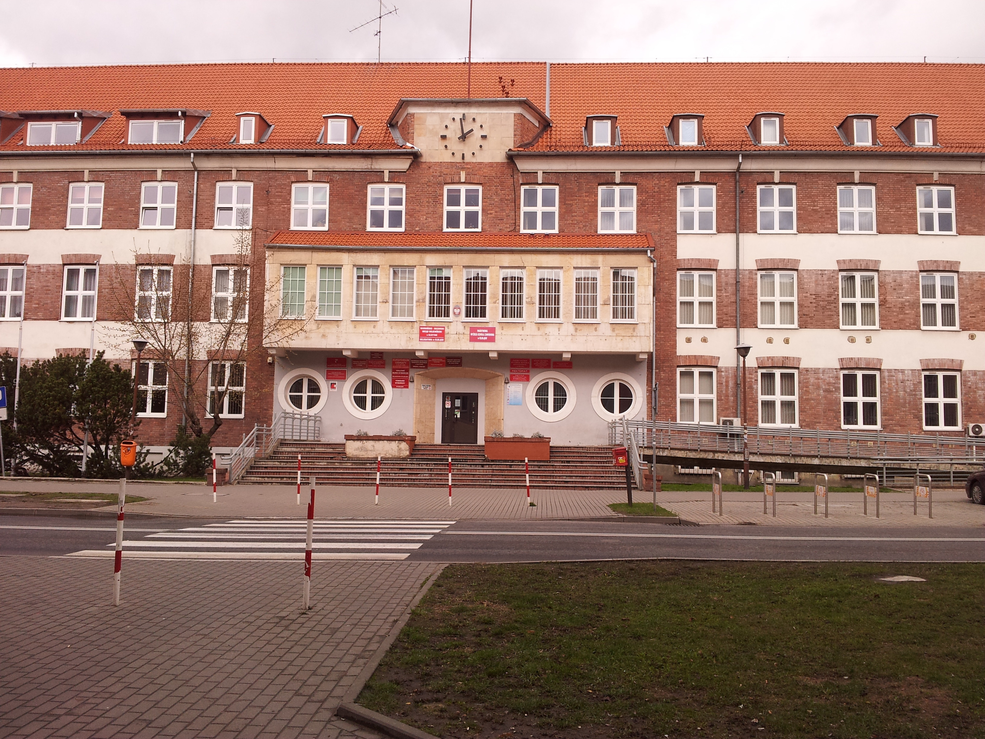 Budynek Delegatury Urzędu Wojewódzkiego w Elblągu oraz Rektoratu i Instytutu Informatyki Stosowanej Państwowej Wyższej Szkoły Zawodowej w Elblągu